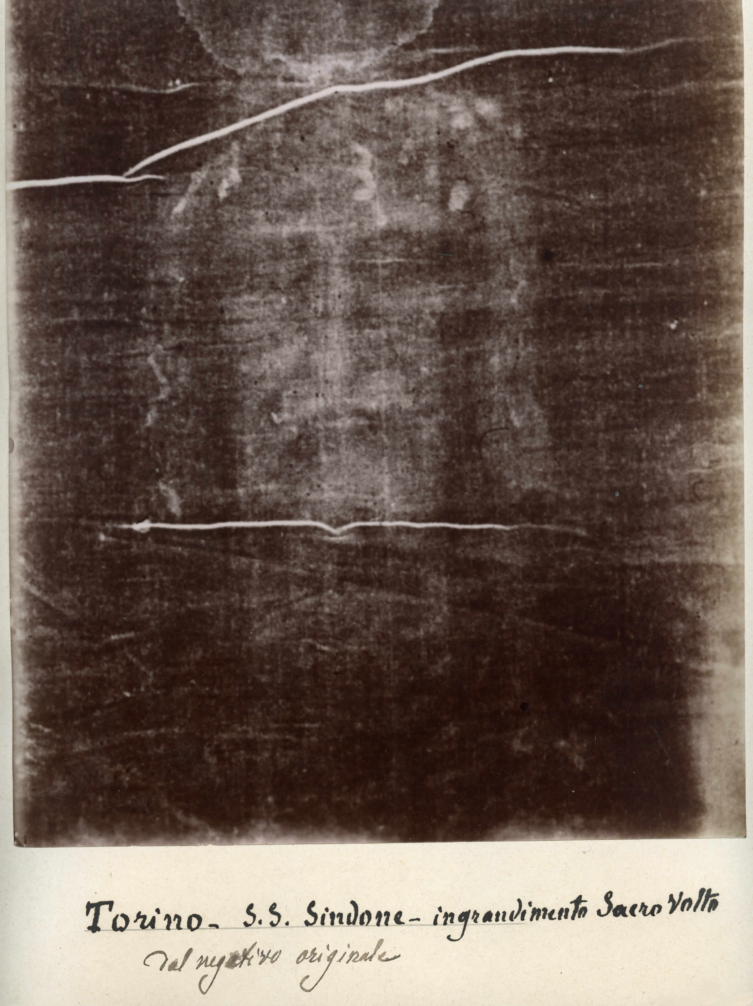 Fotografie byla součástí výstavy: Kontroverze Právní a etická historie fotografie Výstavu připravilo Musée de l’Elysée, Lausanne Secundo Pia (1855-1941) Turínské plátno, květen 1898 Digitální tisk Musée de l’Élysée, Lausanne Secundo Pia (1855-1941) The Shroud of Turin, May 1898 Digital print Musée de l’Élysée, Lausanne